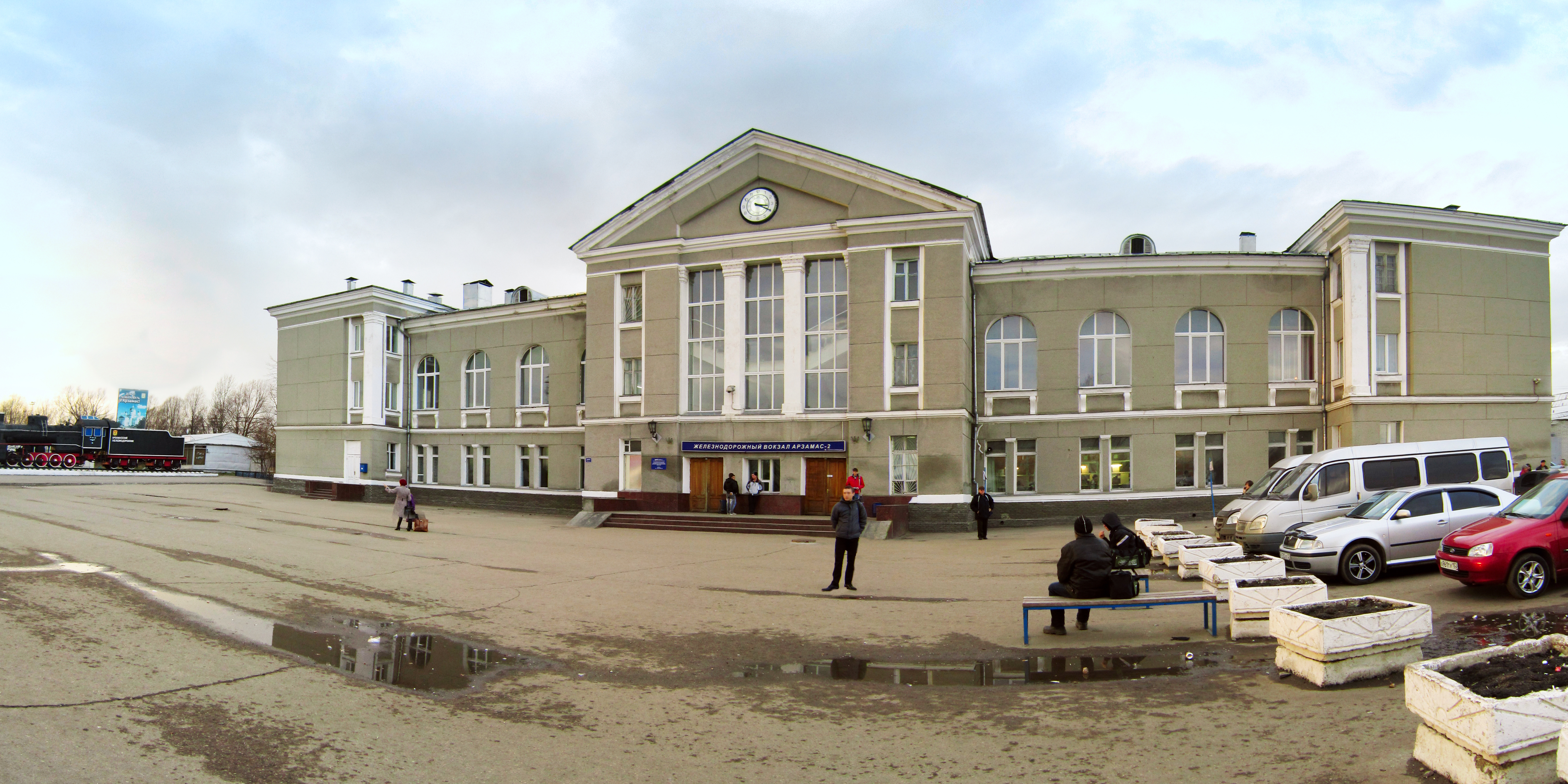 Арзамас 2